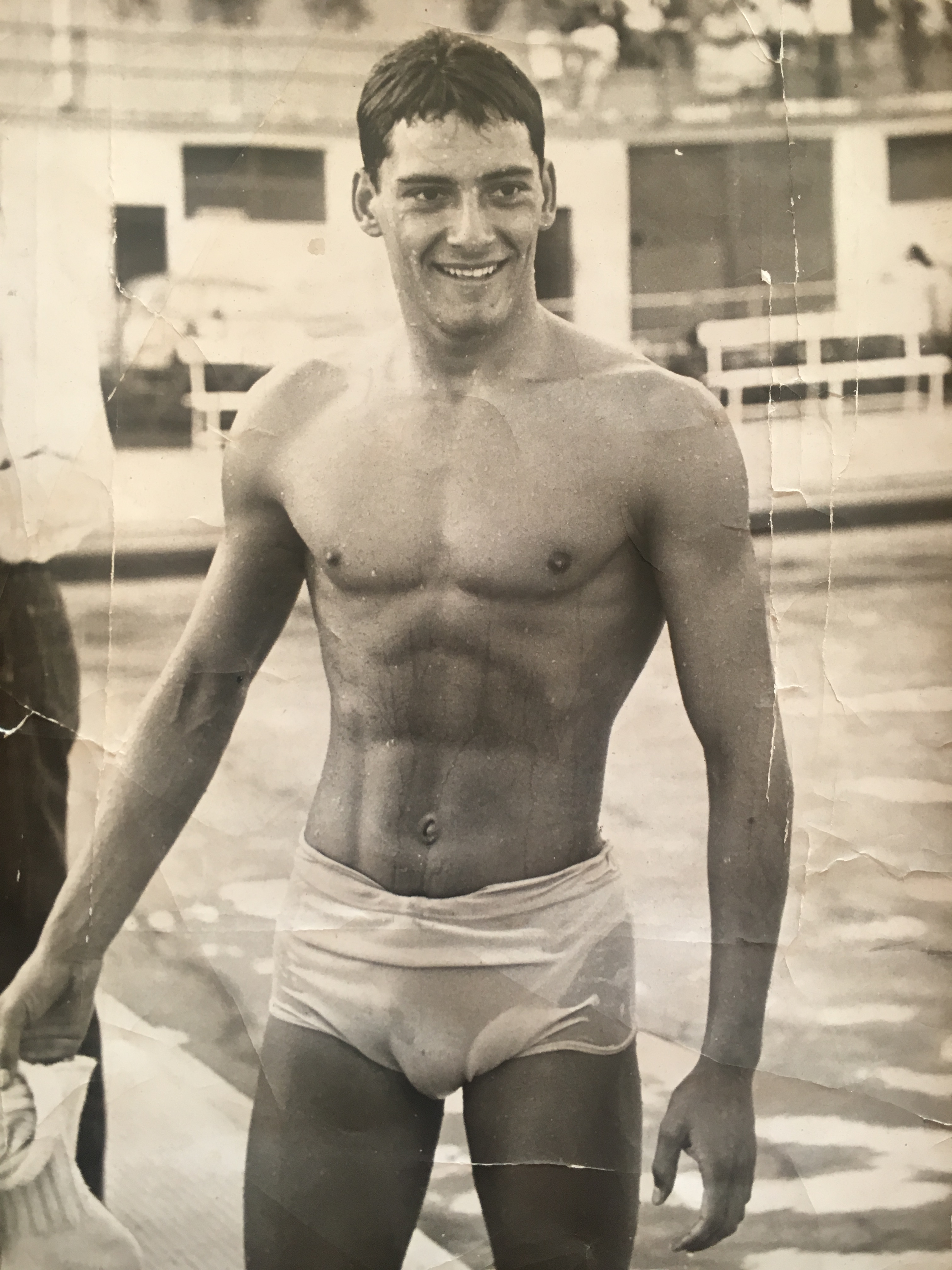 Gilberto Elsa nuotatore italiano